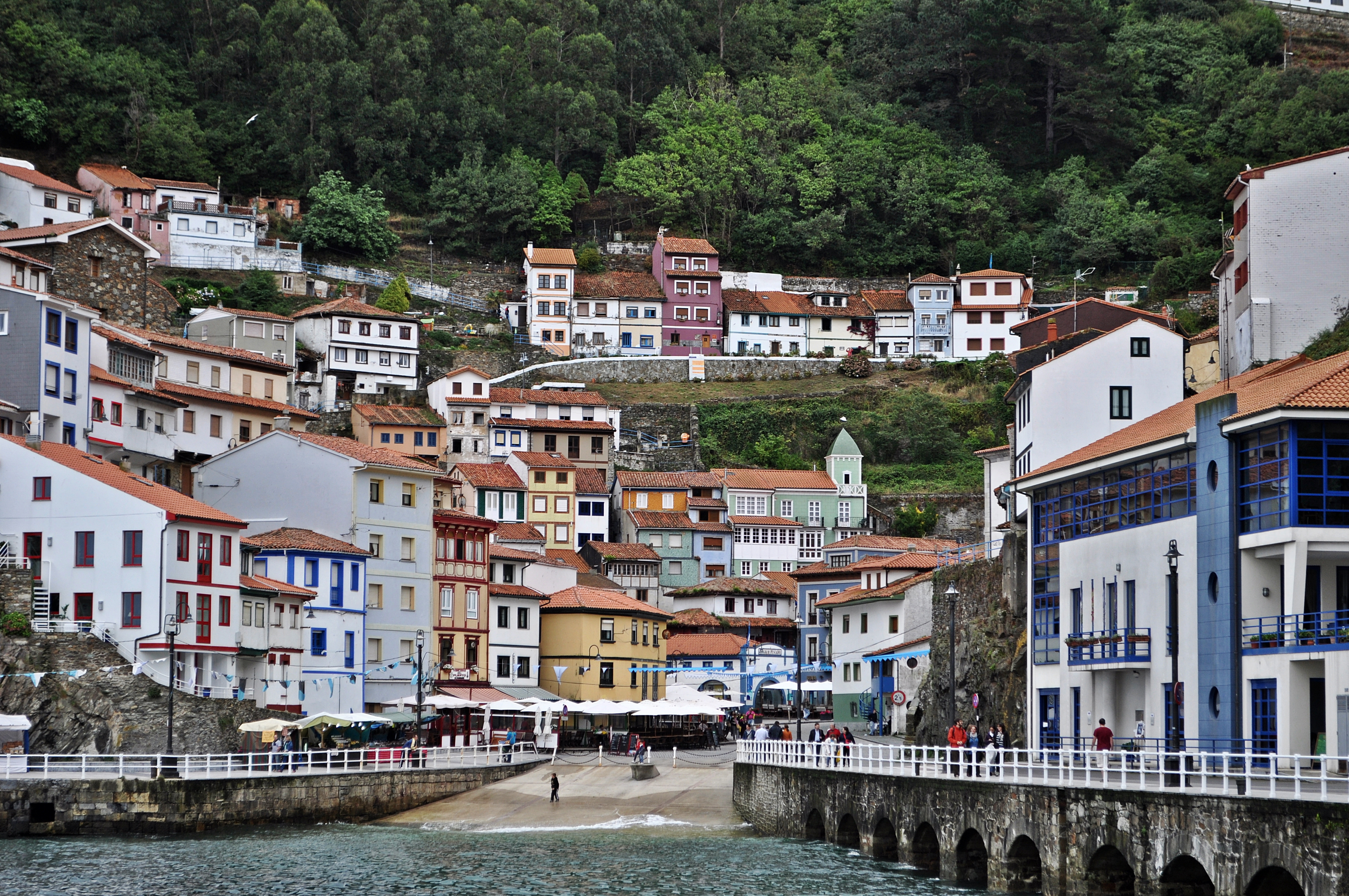 A primera vista